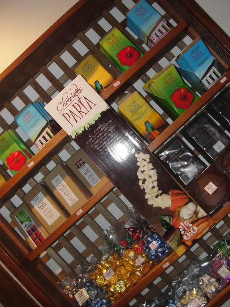 Estado Sucre